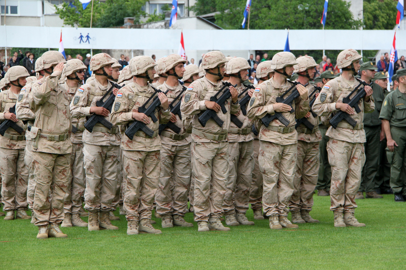 20 godina osnivanja Oružanih snaga Republike Hrvatske, Dana OS RH i Dana HKoV-a.